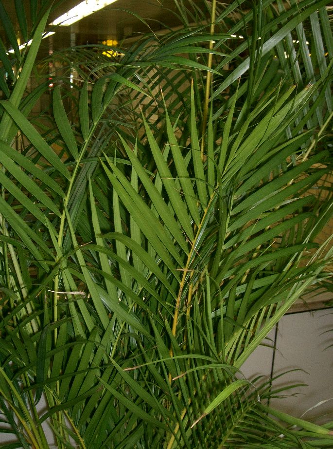 Dypsis lutescens